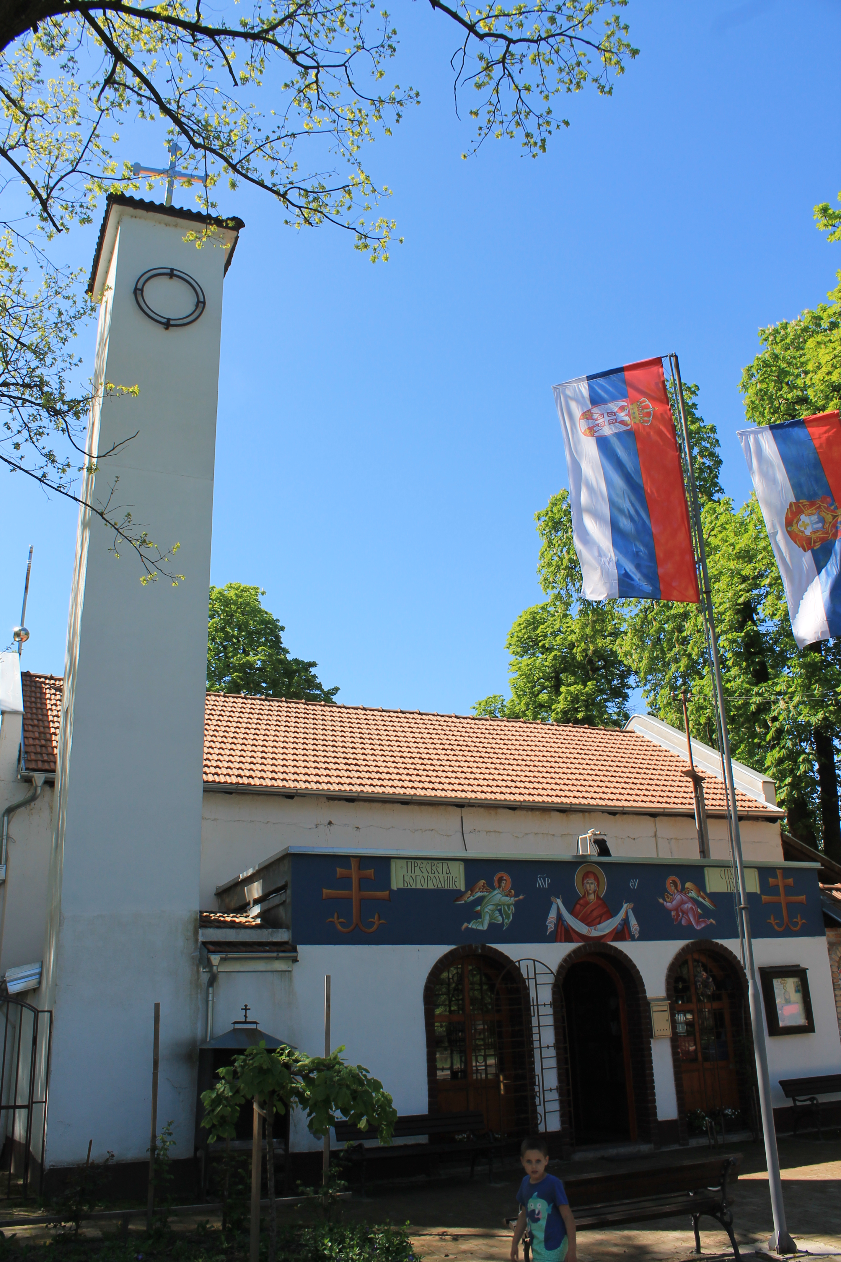 Crkva pokrova Sv. Bogorodice, Petrovaradin